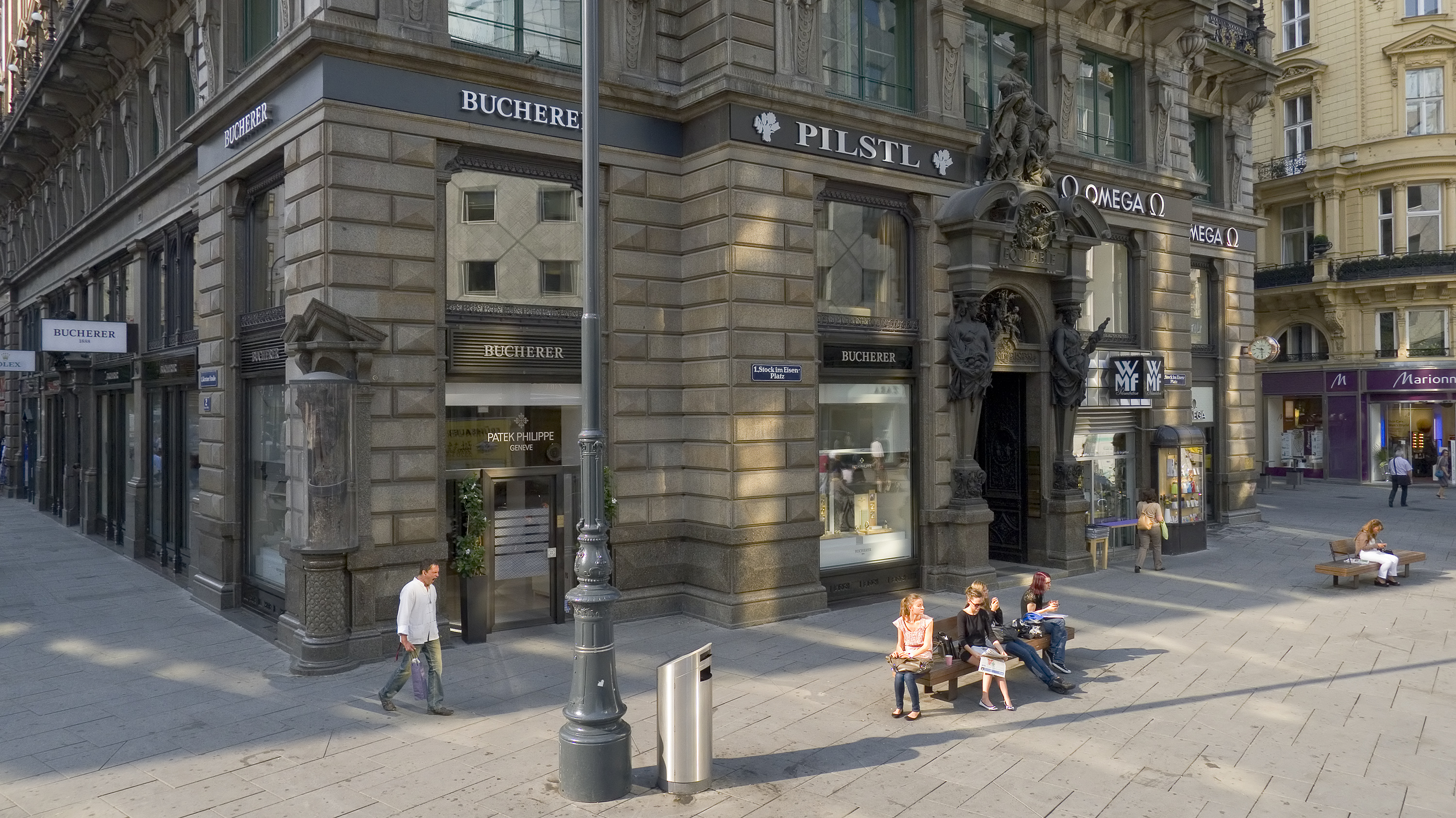 Stock-im-Eisen-Platz in Wien 1 bei Nr. 3 Richtung Süden (Die frontale Beleuchtung der Personen stammt vom reflektieren Licht der Glasfassade des Haas-Hauses)